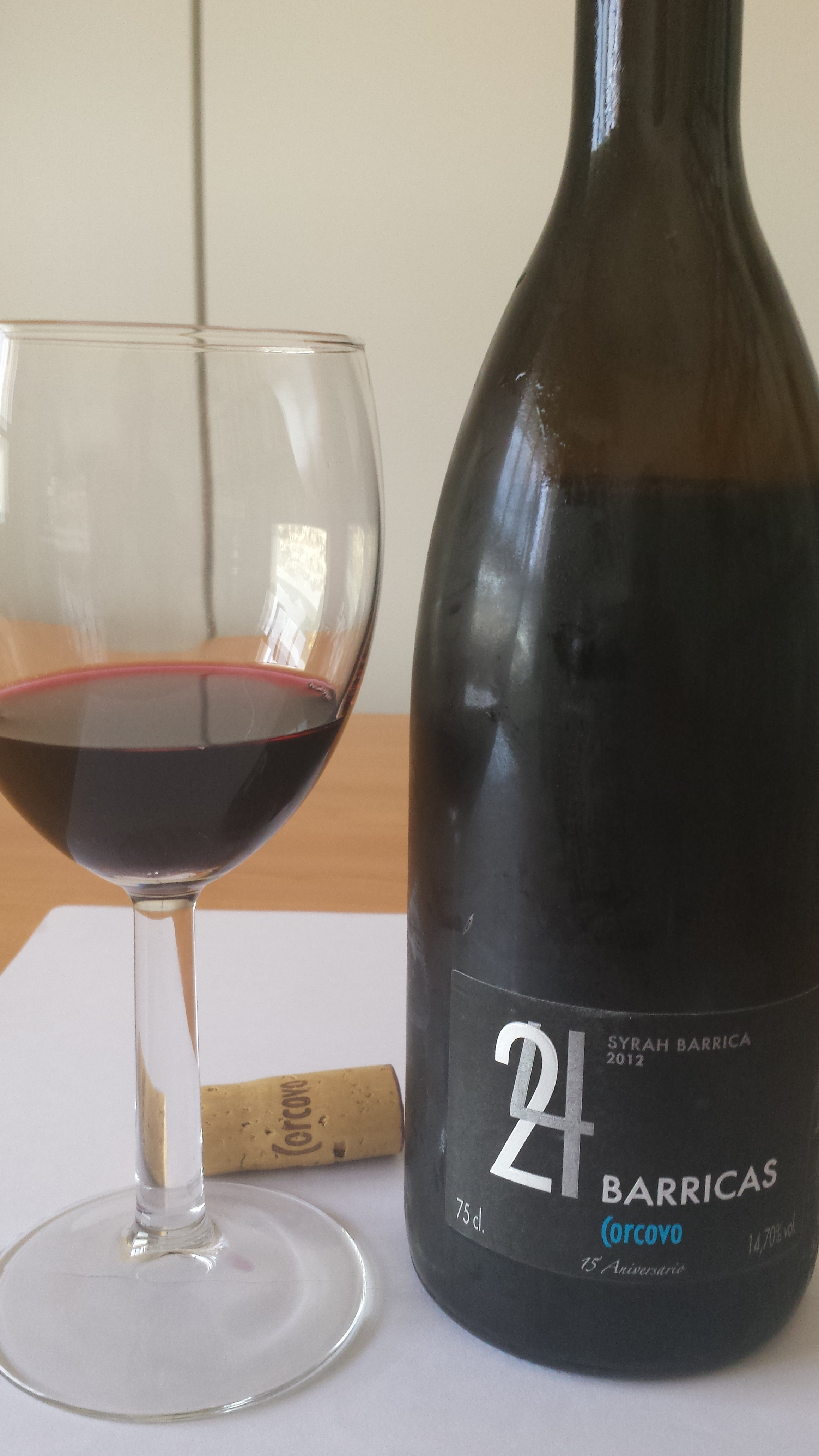 Vino de la DO Valdepeñas, 24 barricas Corcovo, Ciudad Real , España.